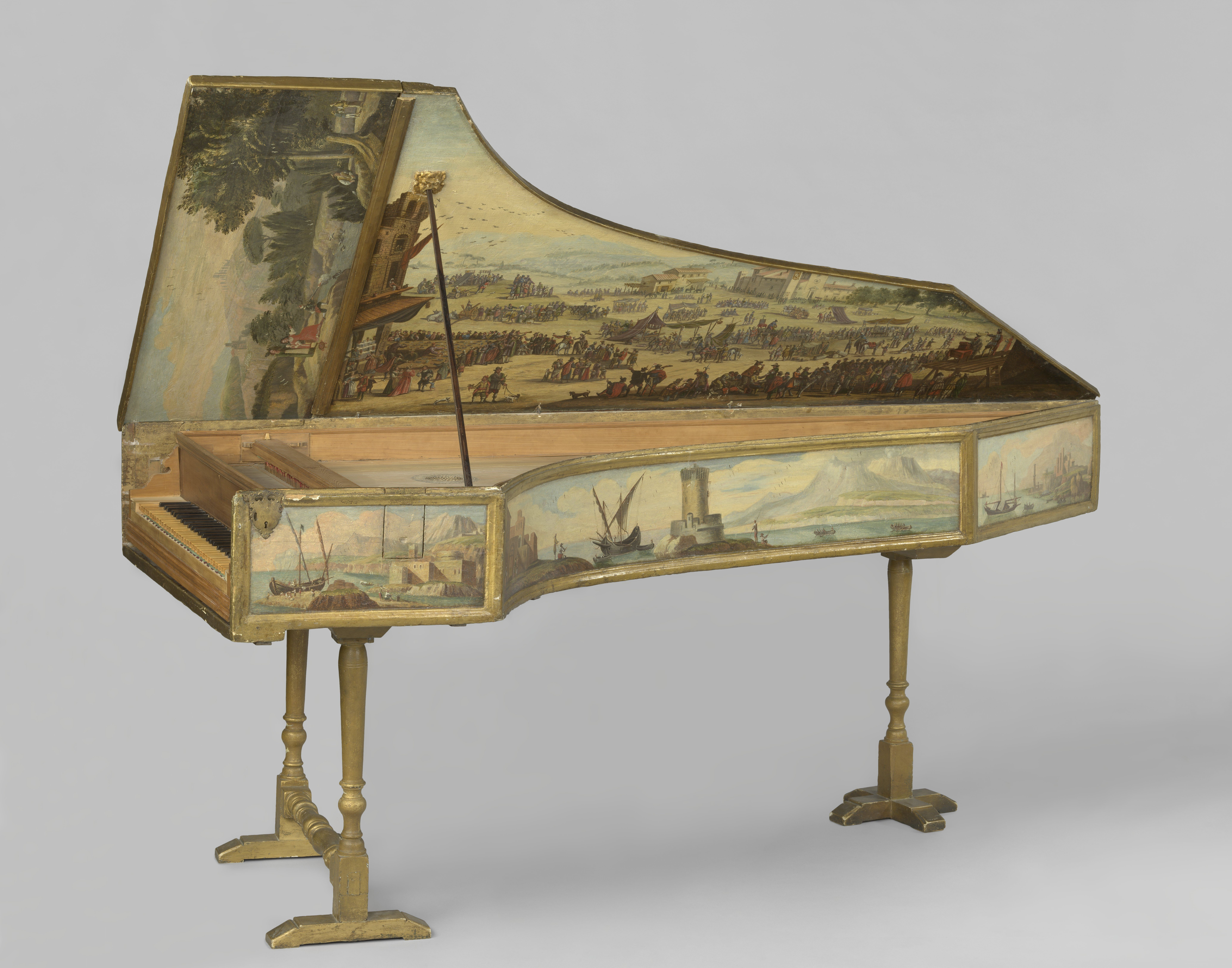 BK-2016-14 Klavecimbel, Onofrio Antonio Guarracino (toegeschreven aan), ca. 1690 cipressen-, populieren-, sparren- en buxushout, perkament en metaal, h 96,4cm × b 241,2cm × d 103,3cm Bruikleen van het Gemeentemuseum Den Haag